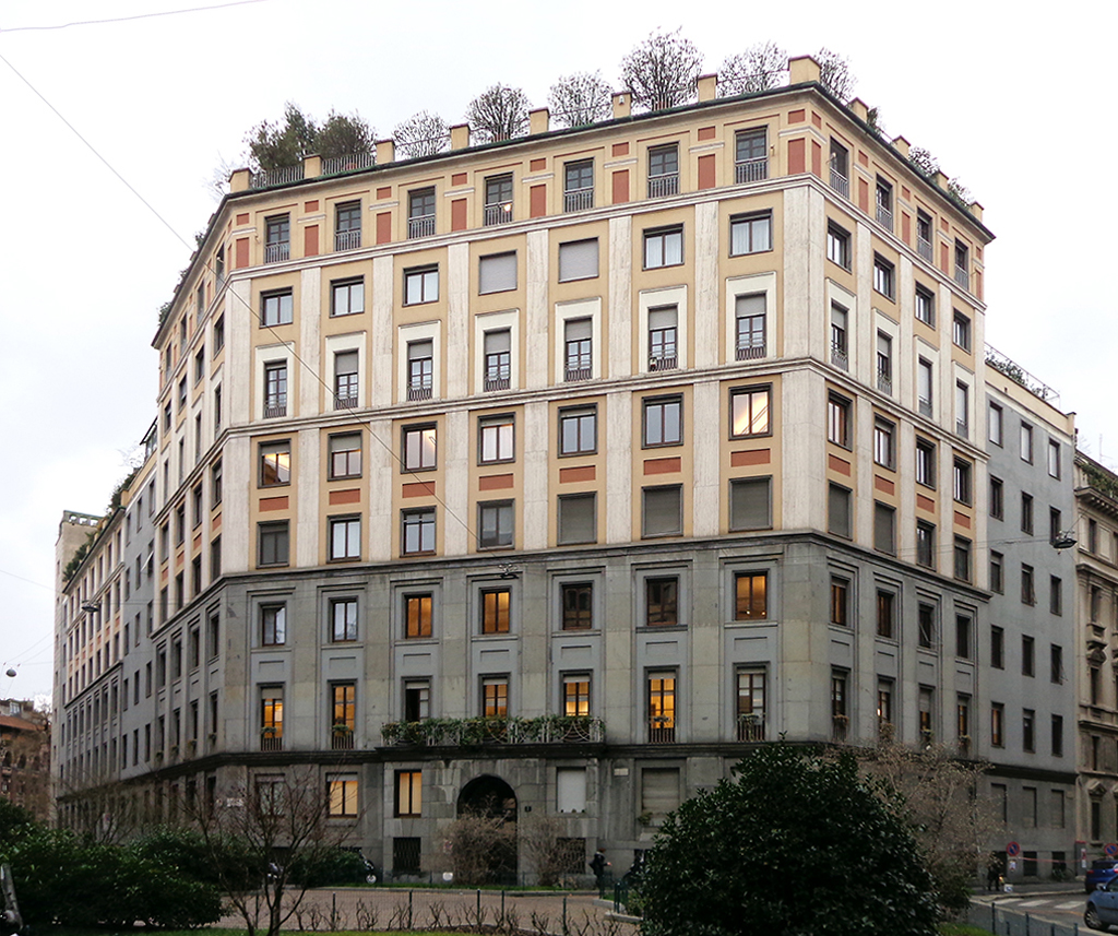 Palazzo Civita a Milano, in piazza Eleonora Duse 2 (angoloo via Pietro Cossa e via Tommaso Salvini). Fu costruito dal 1933 al 1934 su progetto di Gigiotti Zanini.Fonte: Maurizio Grandi e Attilio Pracchi, Milano. Guida all’architettura moderna, Bologna, Zanichelli [1980], 1998, p. 159, ISBN 88-08-05210-9.